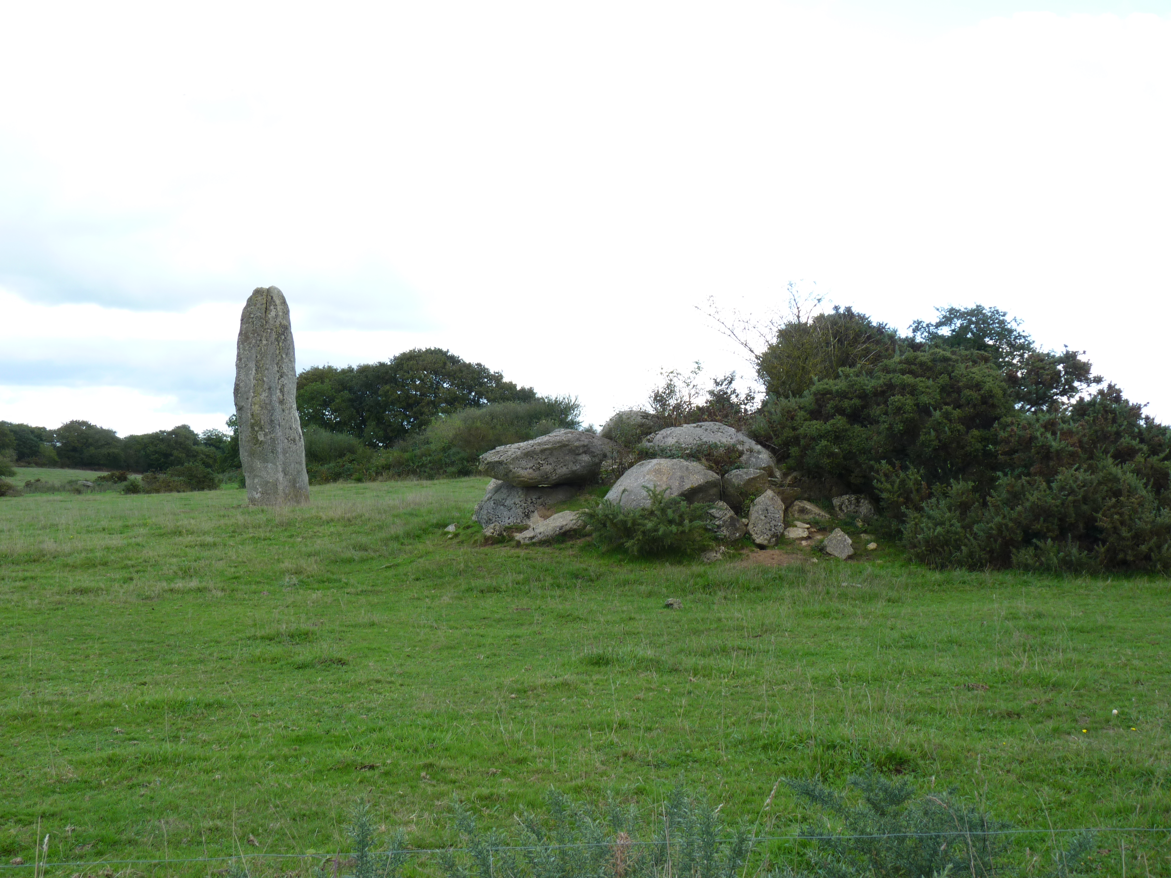 Grand menhir effilé haut de six mètres. Empilement de rochers visibles à droite.